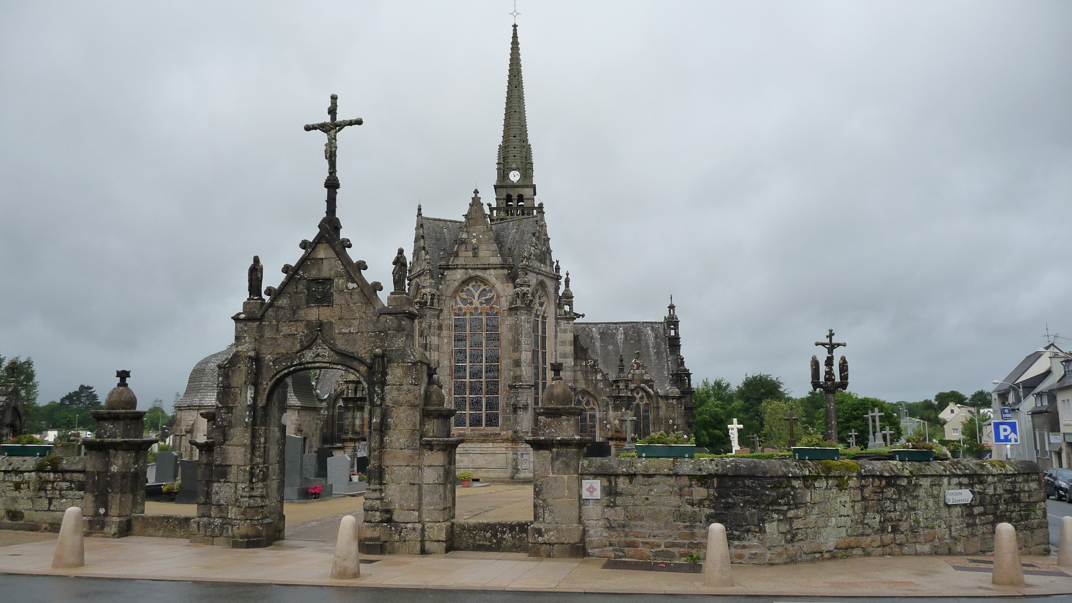 Gouesnou : l'église et l'enclos paroissial